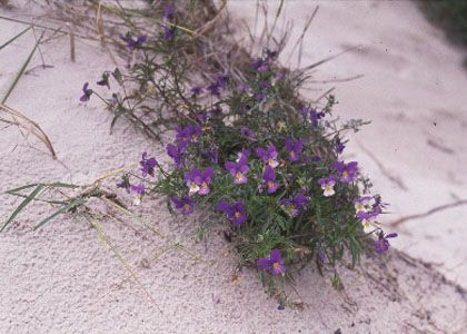 Jūrmalas violīte